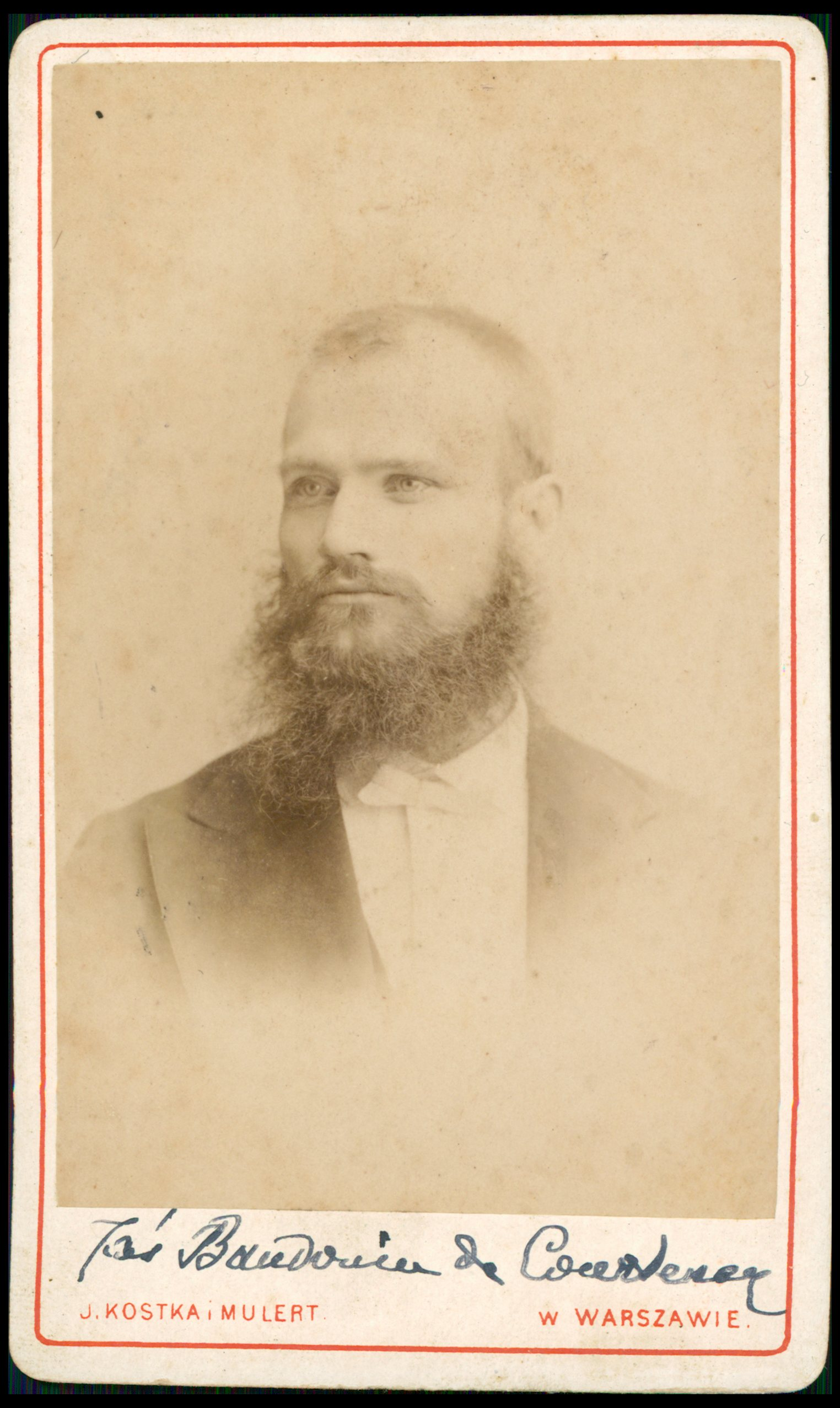 Jan Baudouin de Courtenay, ok. 1865 r.